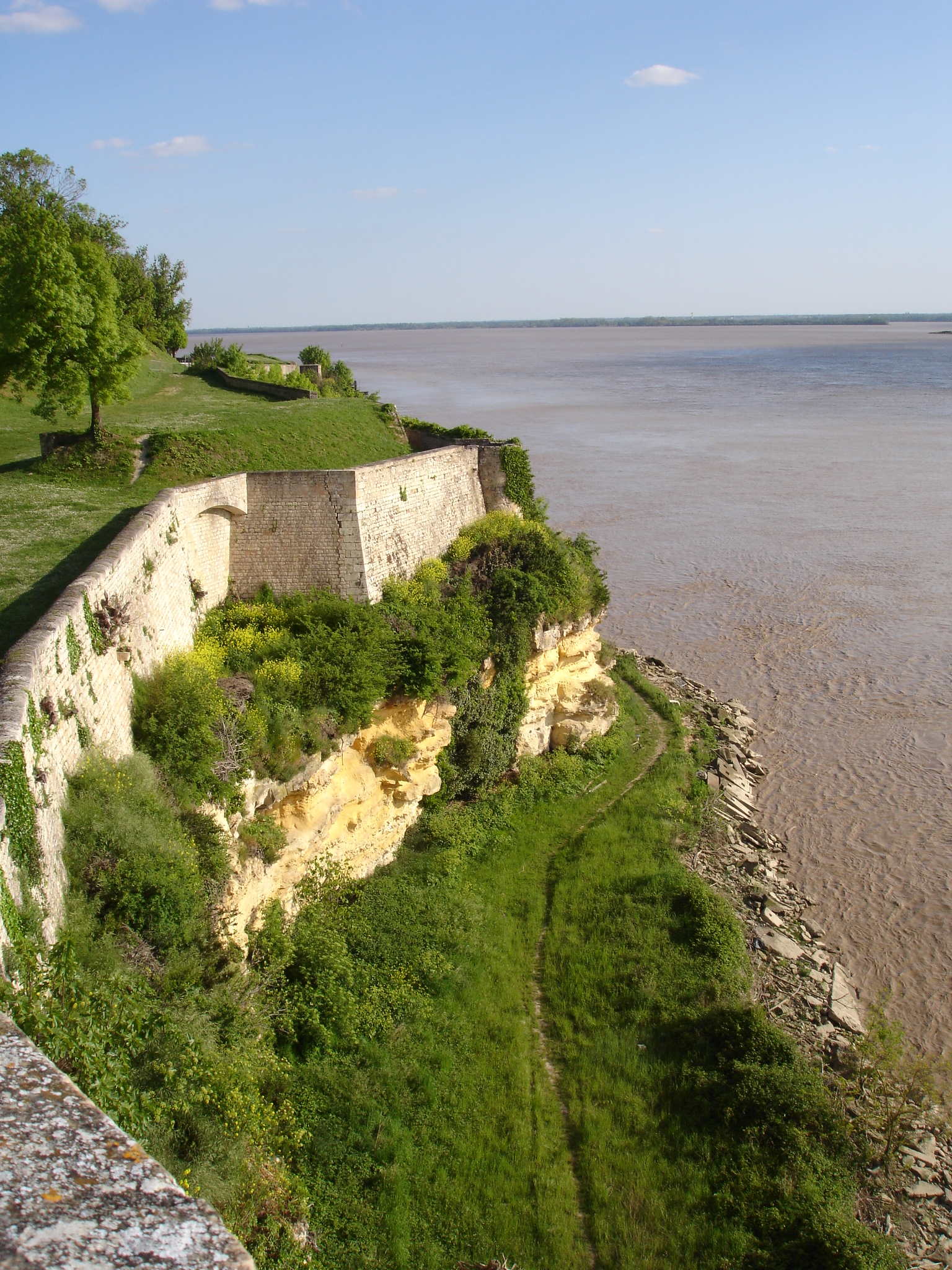 Citadelle de Blaye, Gironde (33), France